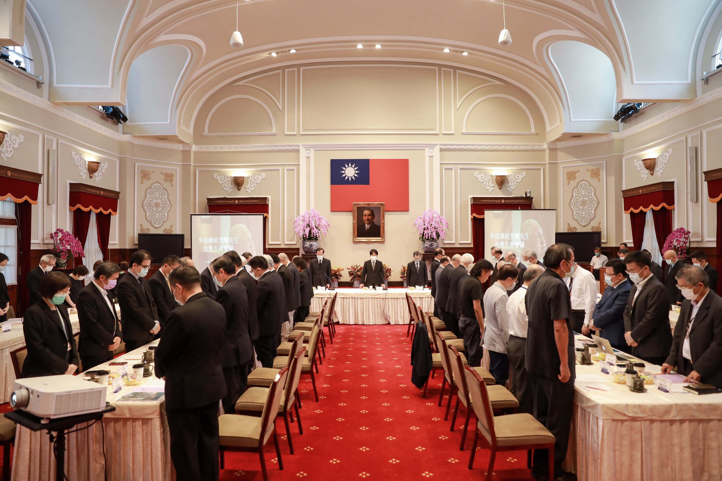 Official Photo by Shufu Liu / Office of the President 總統府召開李前總統登輝先生治喪大員會議 總統府召開李前總統登輝先生治喪大員會議 將妥善辦理國葬 全力協助家屬處理治喪事宜 中華民國109年08月19日 總統府今(19)日下午召開李前總統登輝先生治喪大員會議，由副總統賴清德主持。會後，總統府召開記者會說明治喪大員會議相關內容。 今日治喪大員會議約莫進行40分鐘結束。 包括前副總統連戰、前副總統蕭萬長、行政院長蘇貞昌、立法院長游錫堃、司法院長許宗力、考試院長伍錦霖、監察院長陳菊、前立法院長王金平、前司法院長翁岳生、前考試院長許水德、前監察院長錢復、總統府秘書長李大維、前總統府秘書長吳伯雄、前總統府秘書長黃昆輝、國家安全會議秘書長顧立雄、張忠謀先生、黃崑虎先生、李遠哲先生、彭淮南先生、王文淵先生、陳博志先生、台灣民眾黨主席柯文哲、時代力量代理黨主席邱顯智、台灣團結聯盟黨主席劉一德、內政部長徐國勇、外交部長吳釗燮及國防部長嚴德發等均出席該項會議。